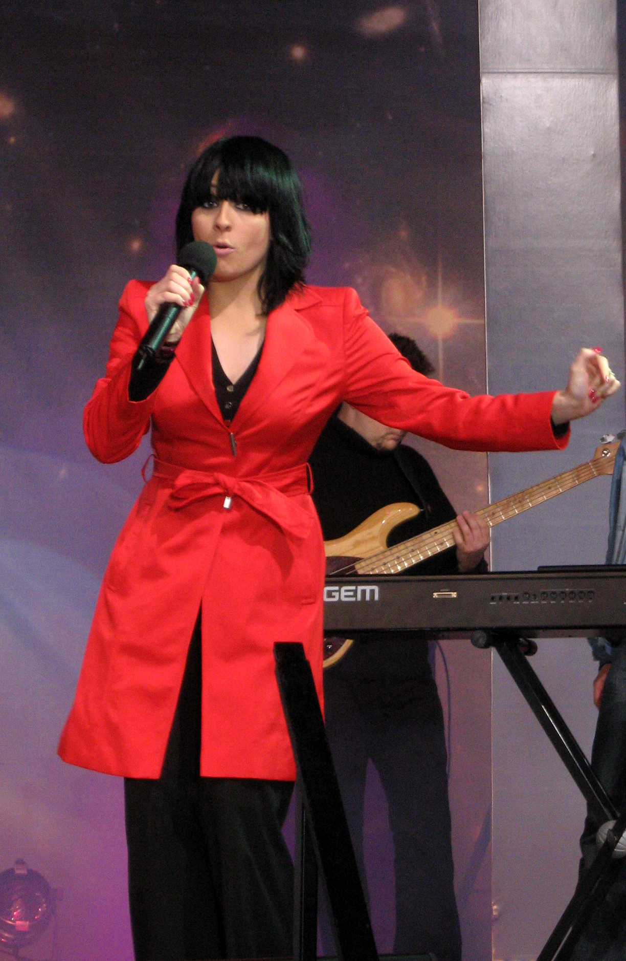 Tatiana Okupnik na dniu Otwartym TVP